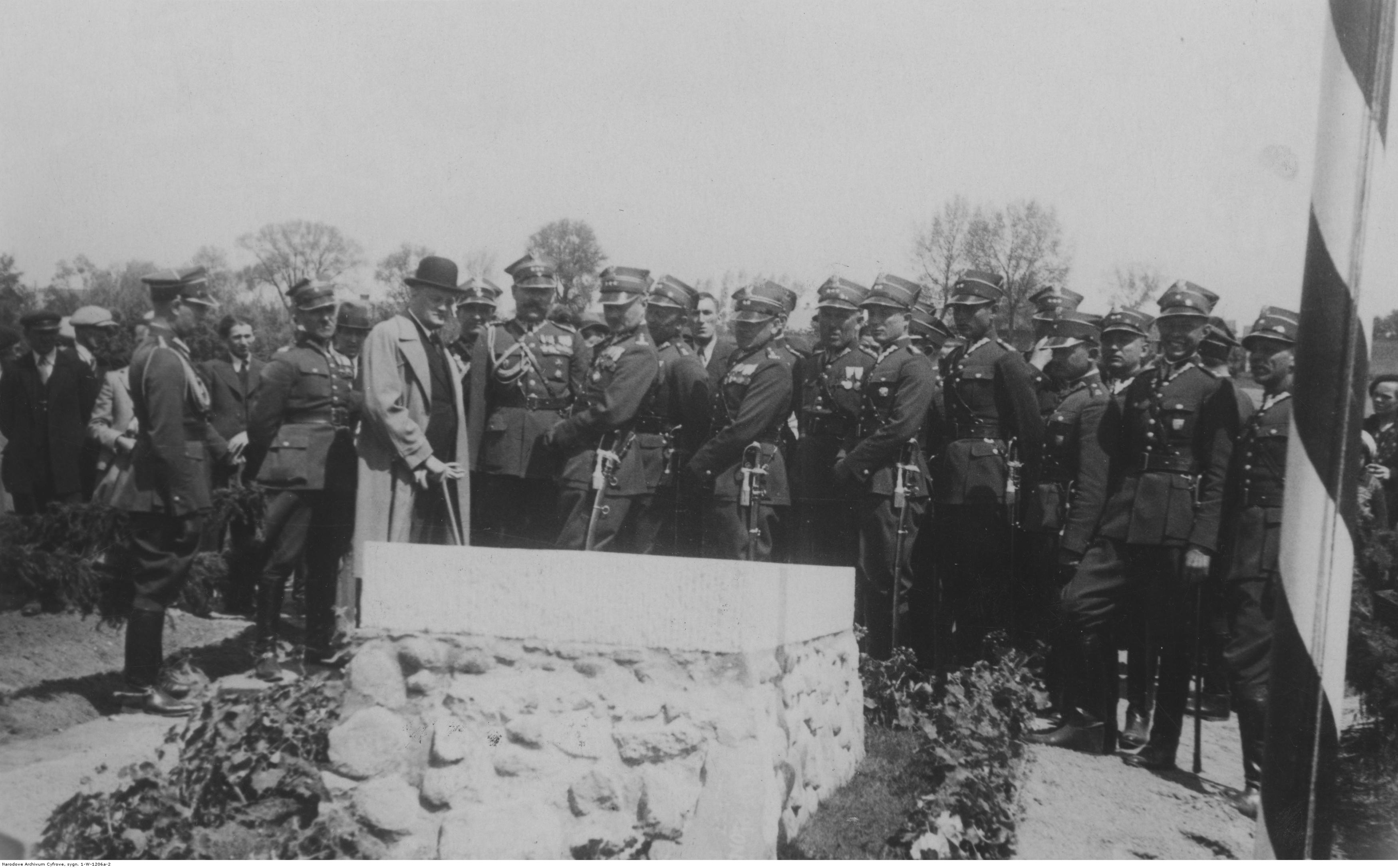 Święto 29 Pułku Strzelców Kaniowskich w Kaliszu. Wkopanie kamienia pamiątkowego w miejscu, gdzie Józef Piłsudski wręczył pułkowi sztandar. Widoczni m.in. płk Jarosław Okulicz-Kozaryn, płk Stefan Kossecki, starosta Henryk Ostaszewski. Koncern Ilustrowany Kurier Codzienny - Archiwum Ilustracji. Sygnatura: 1-W-1206a-2